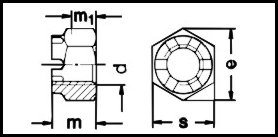 DIN 935